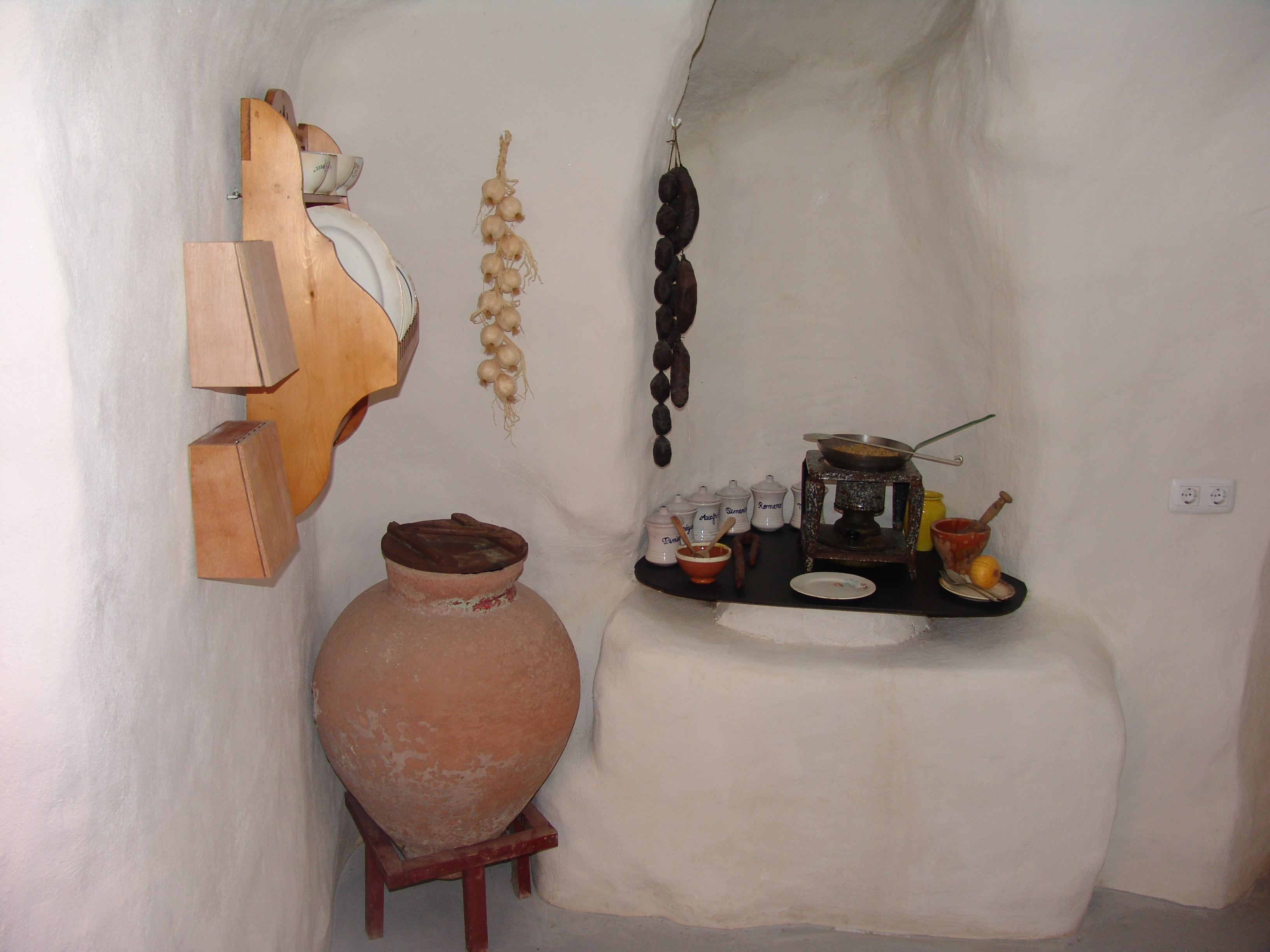 Espacio dedicado a la vida cotidiana en la cueva "Vida y tradiciones en las Casas Cueva"